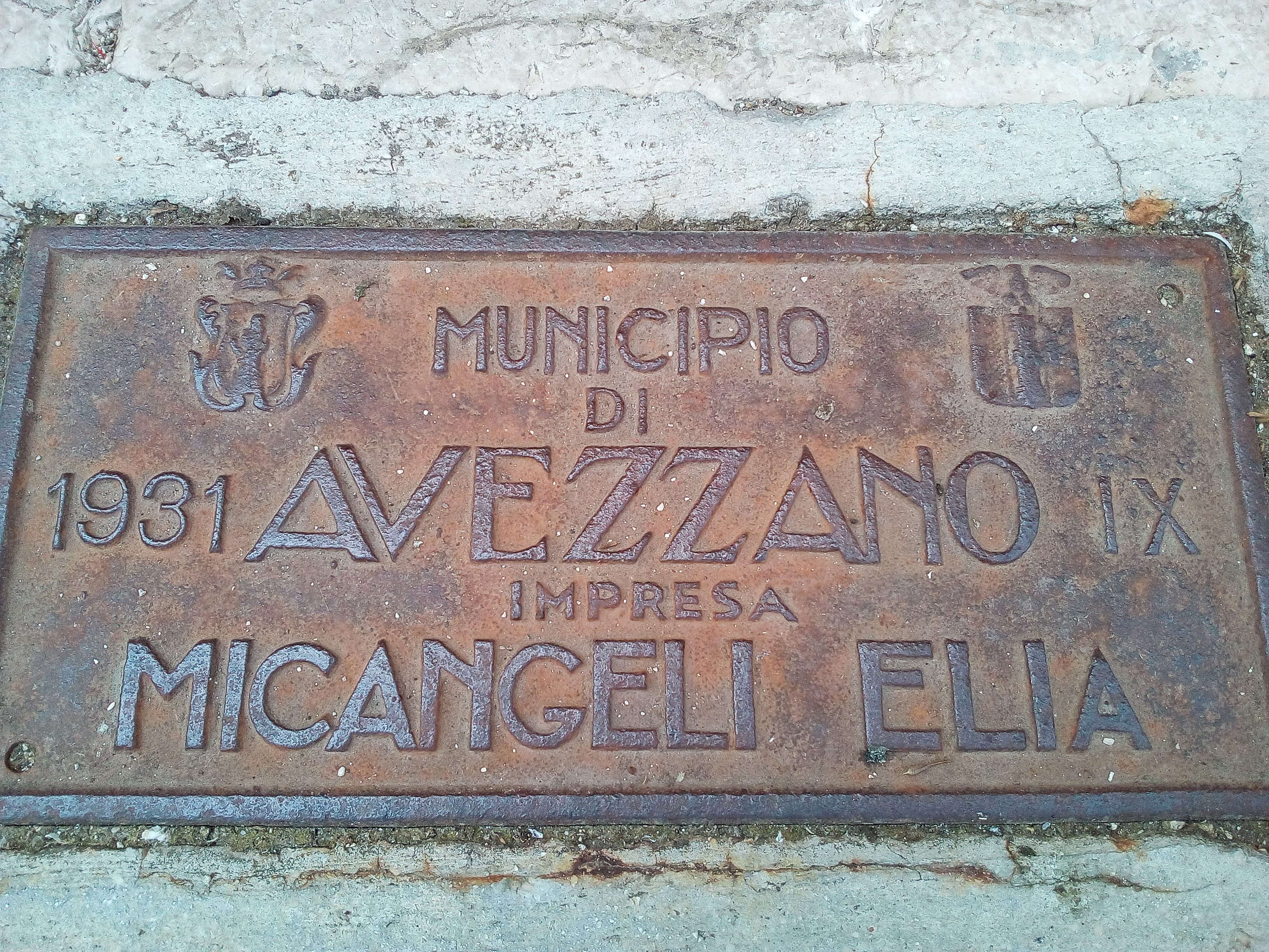 Targa Elia Micangeli del 1931